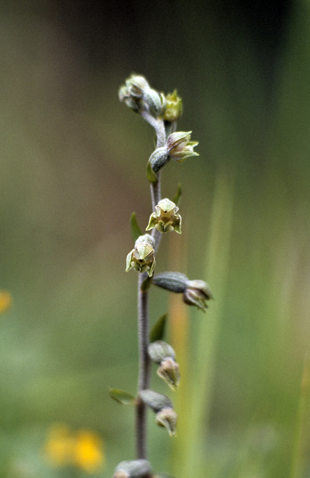 Kleinblättrige Stendelwurz (Epipactis microphylla), San Gimignano (Italy), 23.05.1983